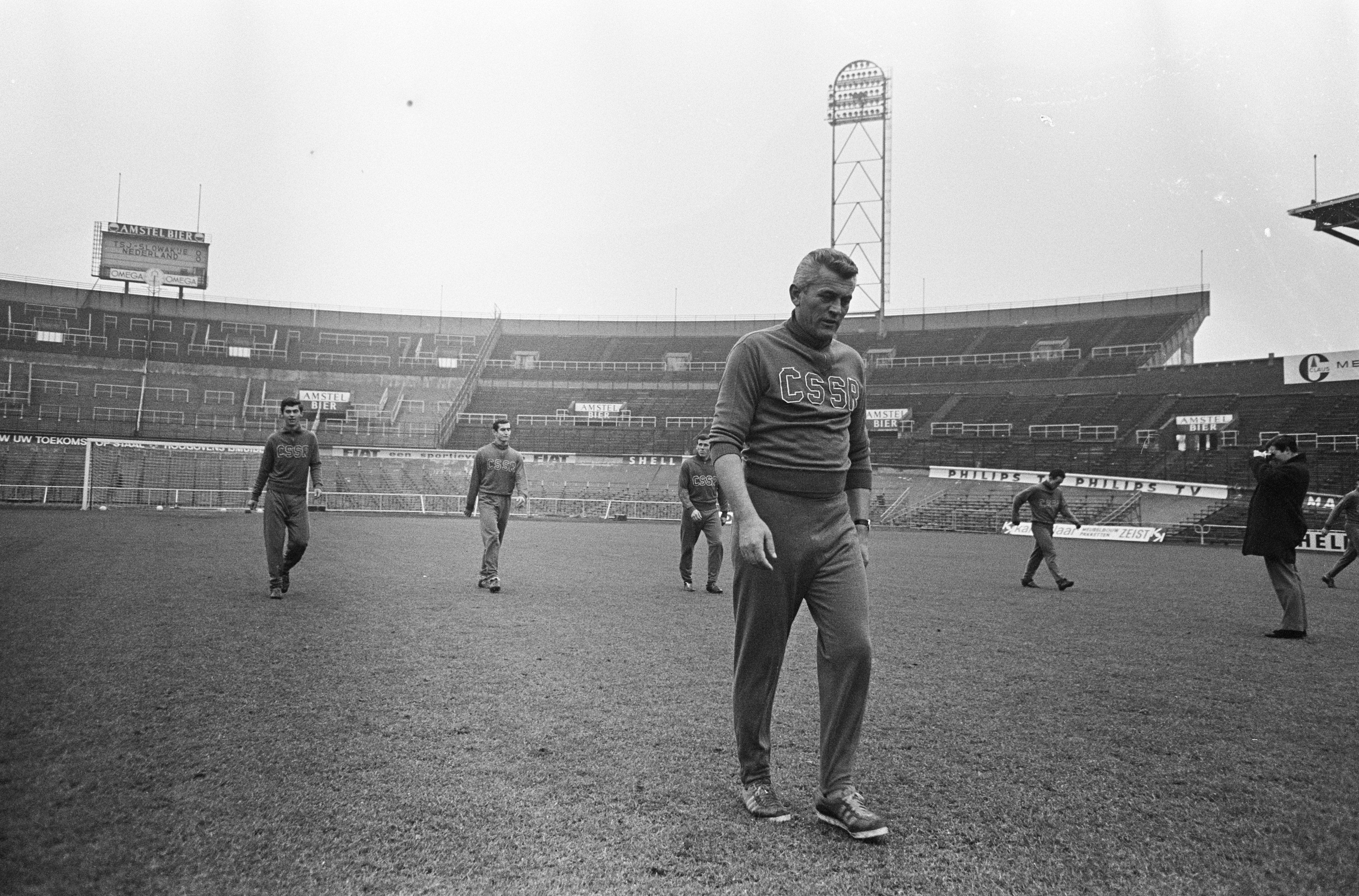 Le sélectionneur Jozef Marko et plusieurs joueurs de l'équipe de Tchécoslovaquie de football à l'entrainement en 1966.